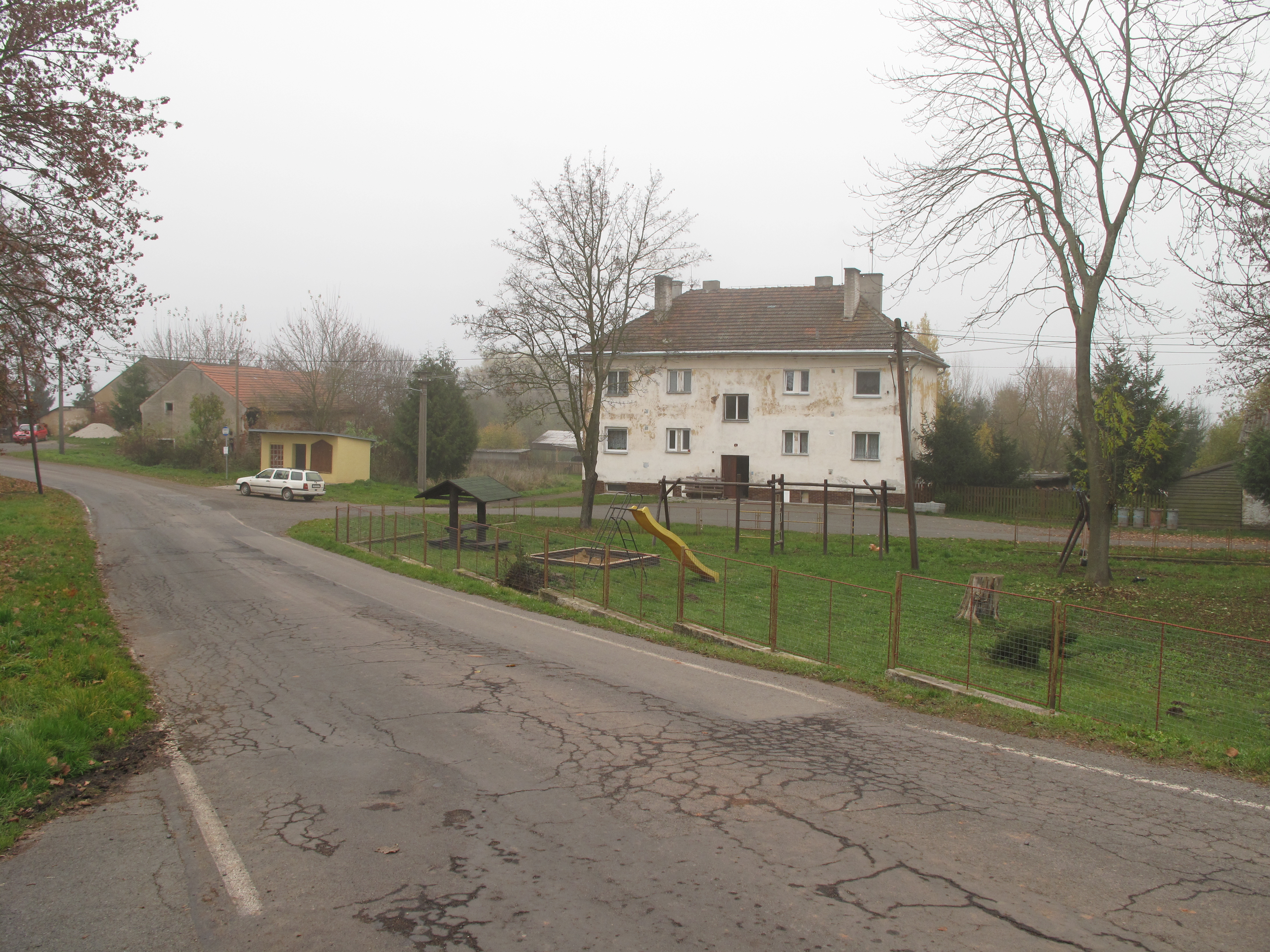 Náves ve Zbraslavy. Okres Karlovy Vary, Česká republika.